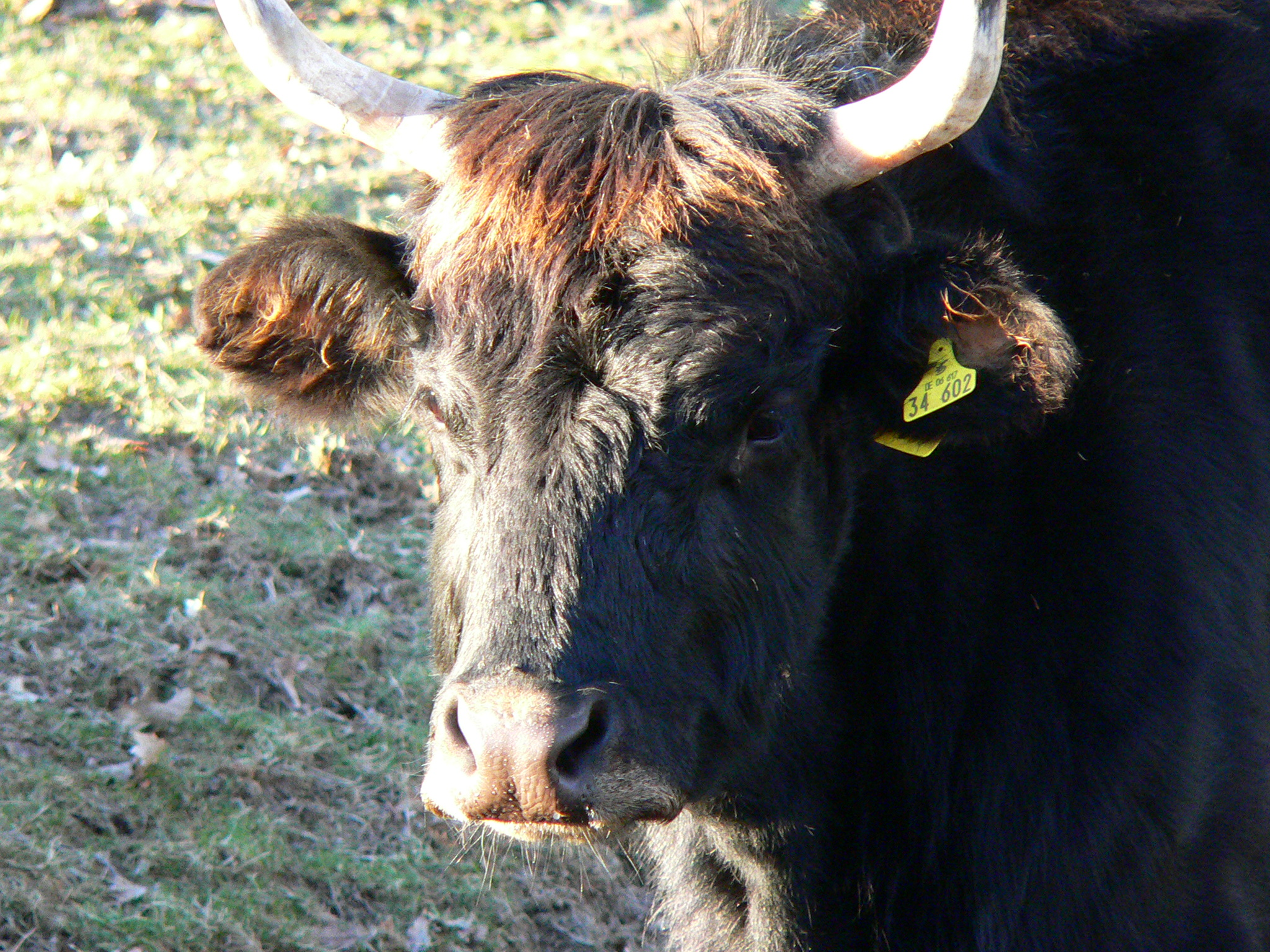 Im Tierpark Sababurg im Reinhardswald (Hessen), Ur (Kuh)